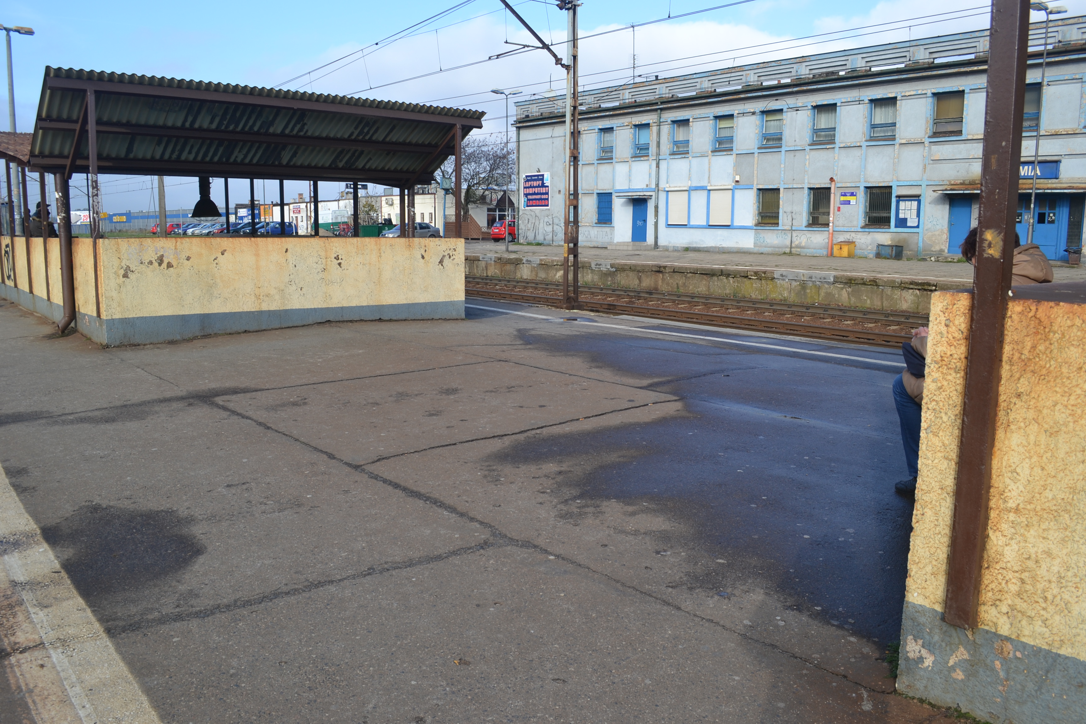 peron i dworzec w Rumii